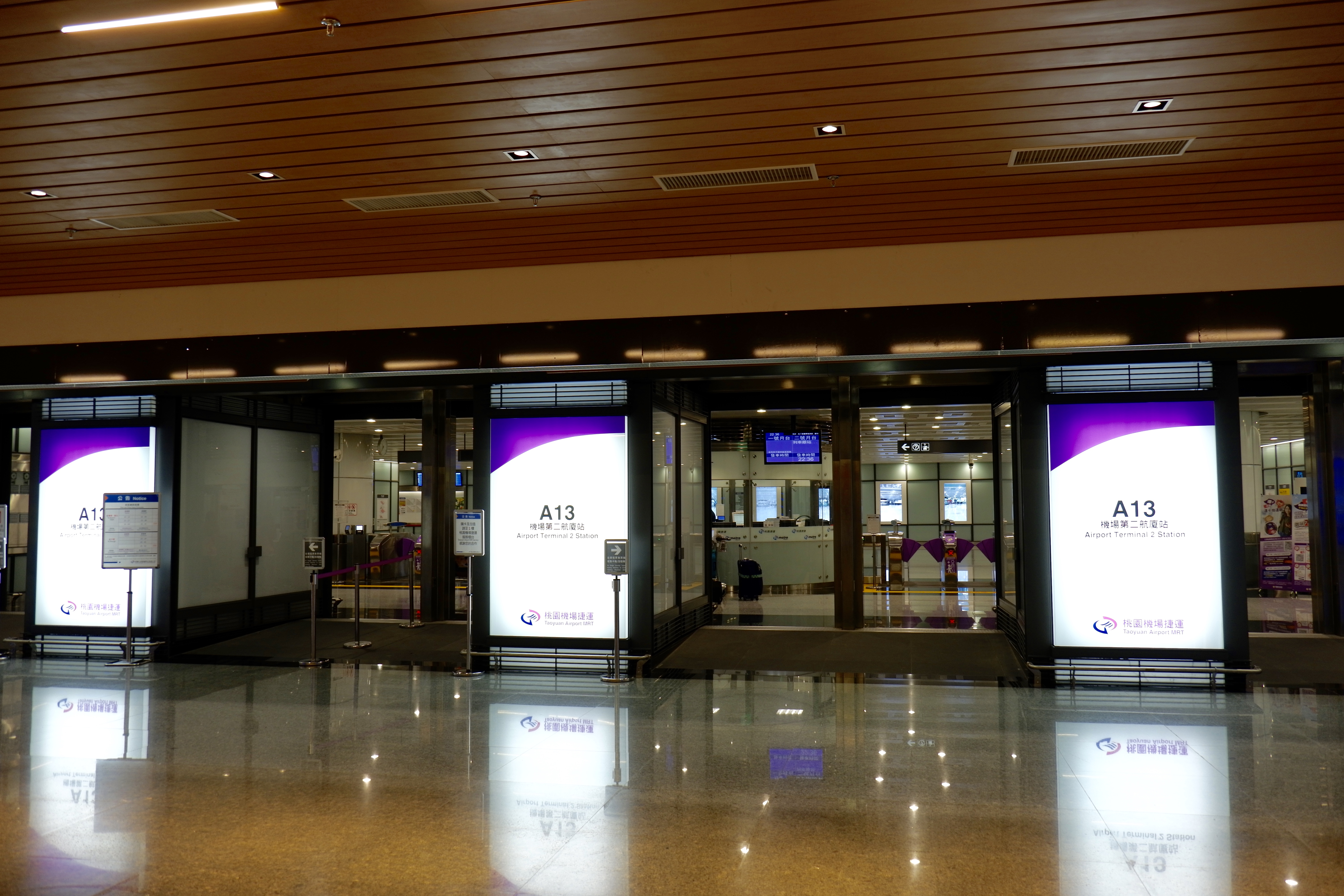 桃園國際機場捷運第二航廈站入口。